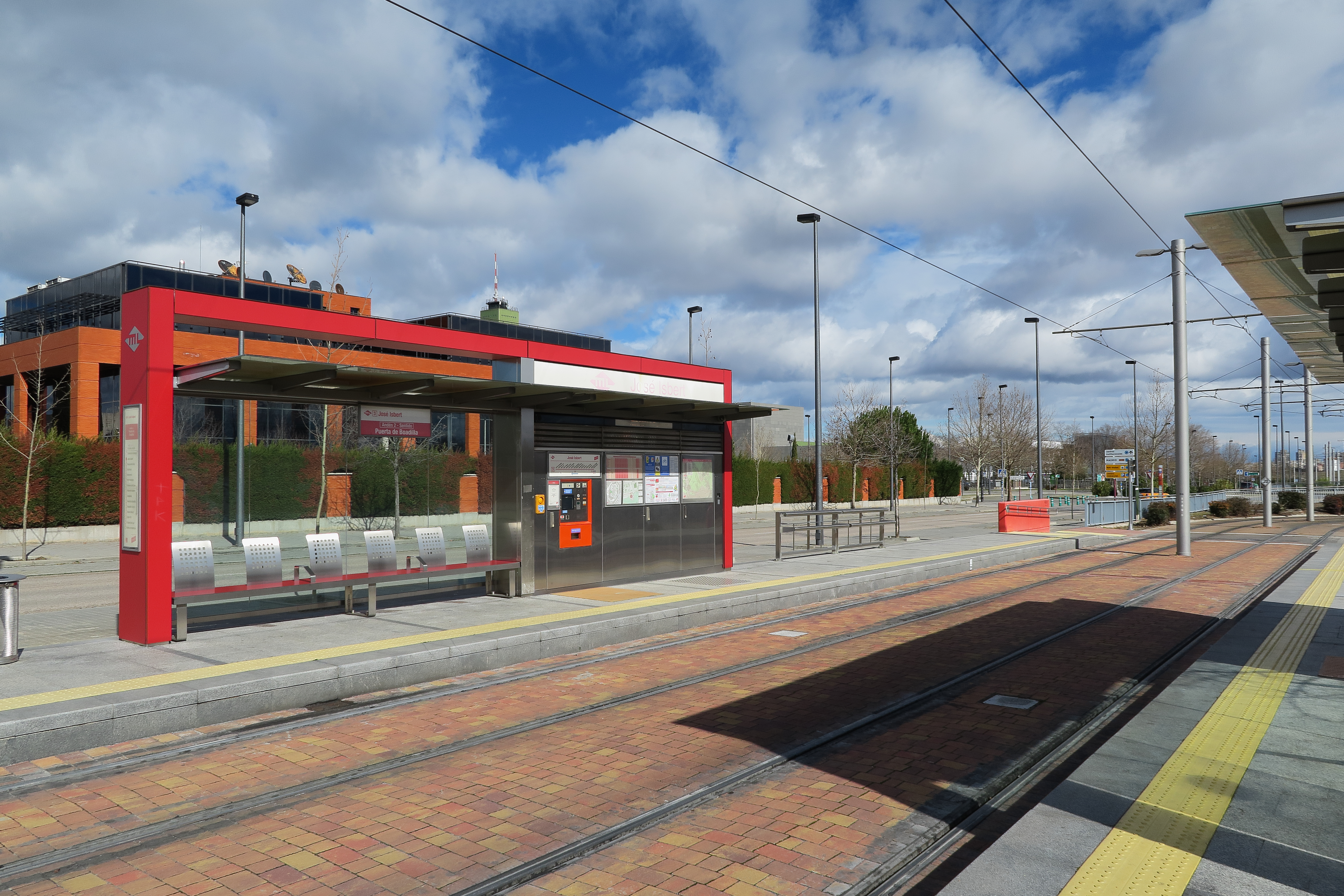 Estación de José Isbert